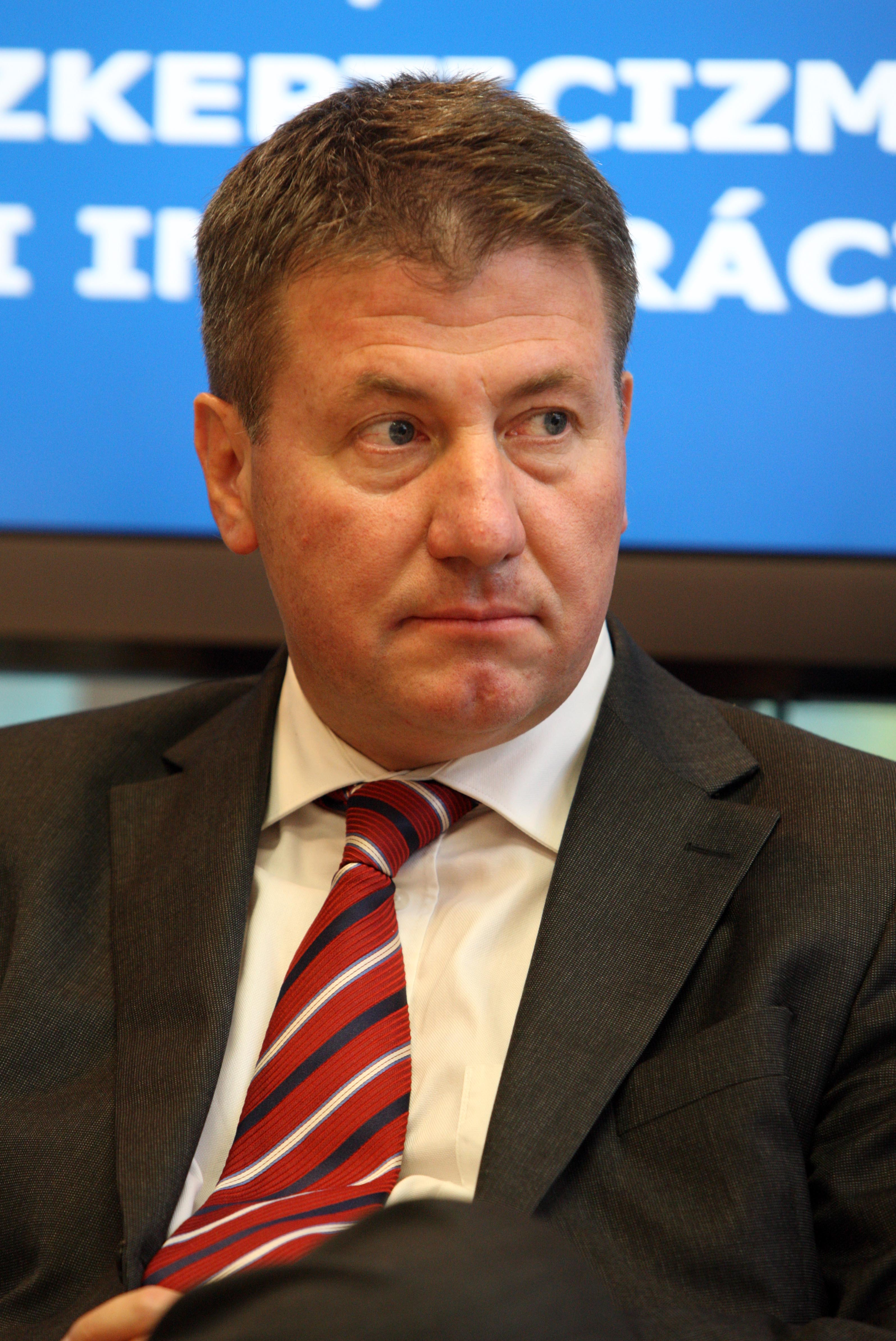 Prőhle Gergely külügyi államtitkár. Fotó: Európai Bizottság/ Dudás Szabolcs